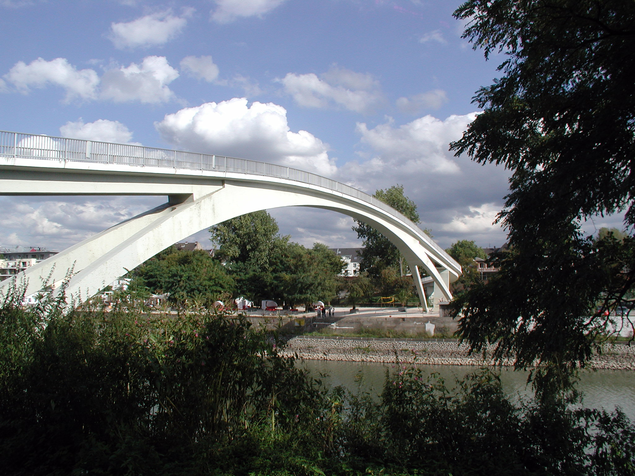 Köln, Mülheimer Hafenbrücke